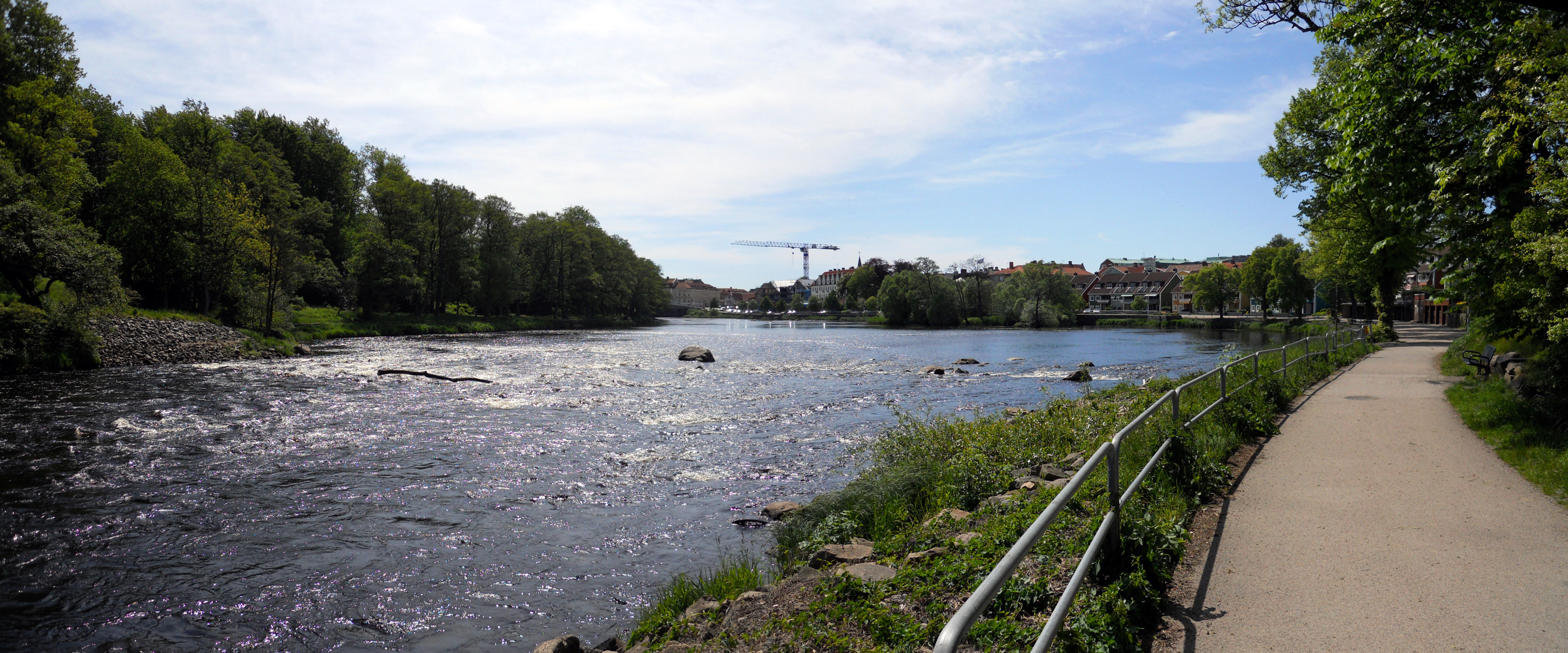 Panorama över Ätran i Falkenberg.